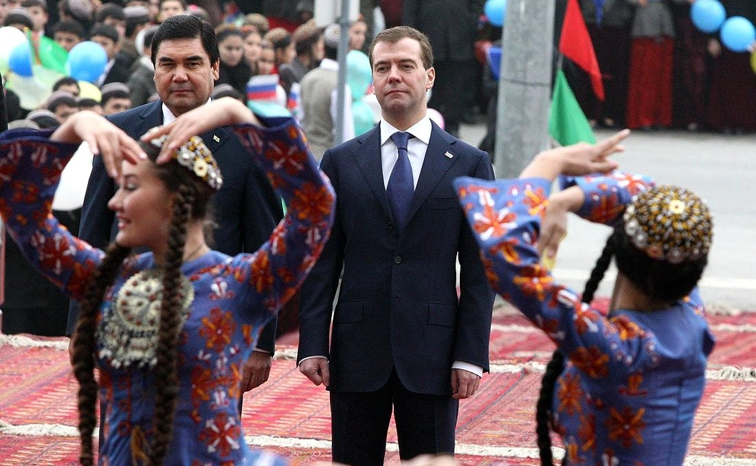 На церемонии открытия нового здания российско-туркменской средней общеобразовательной школы имени Пушкина.